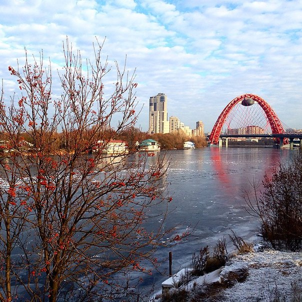 Вантовый мост с летающей тарелкой в Серебряном Бору